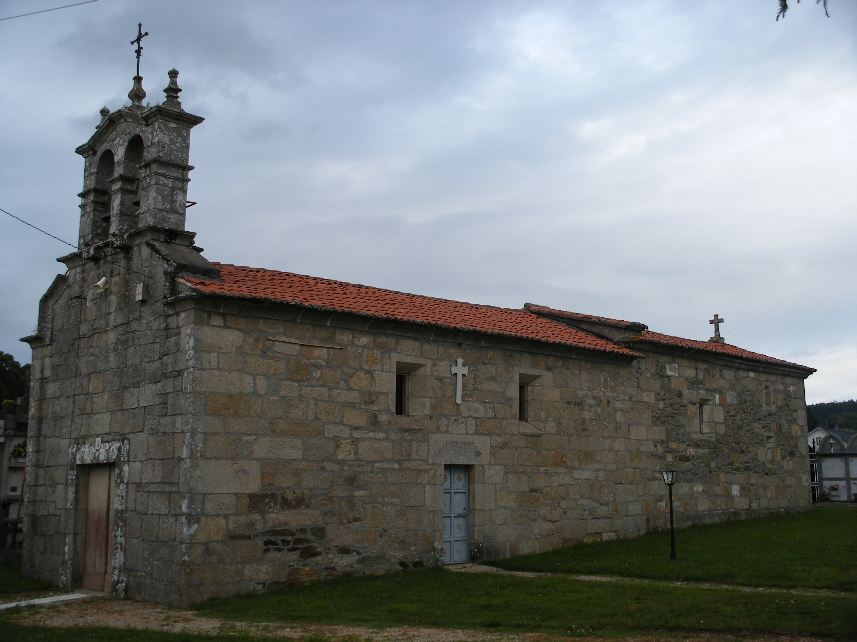 Igrexa parroquial de Paderne